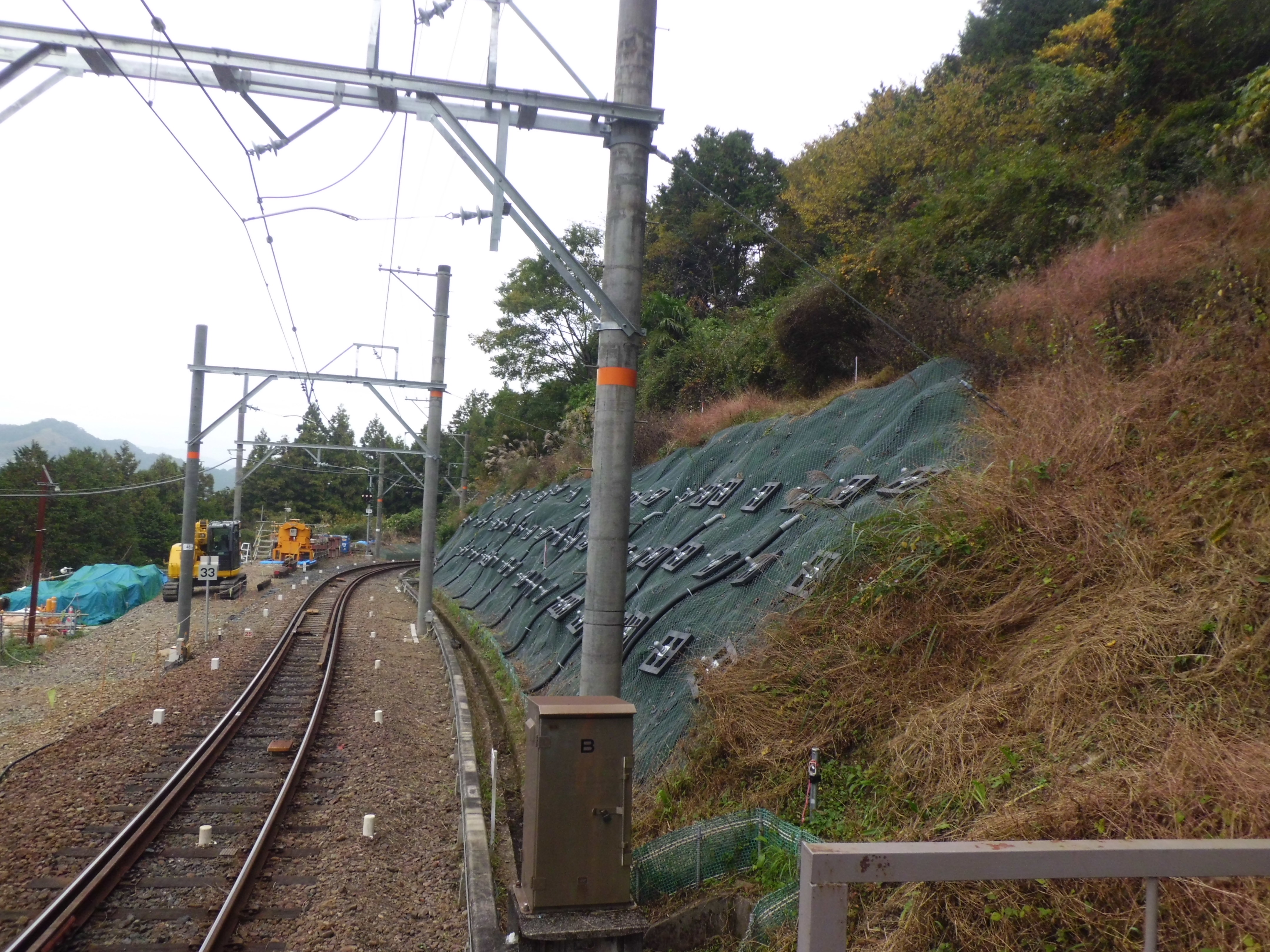 上古沢駅難波方山側斜面